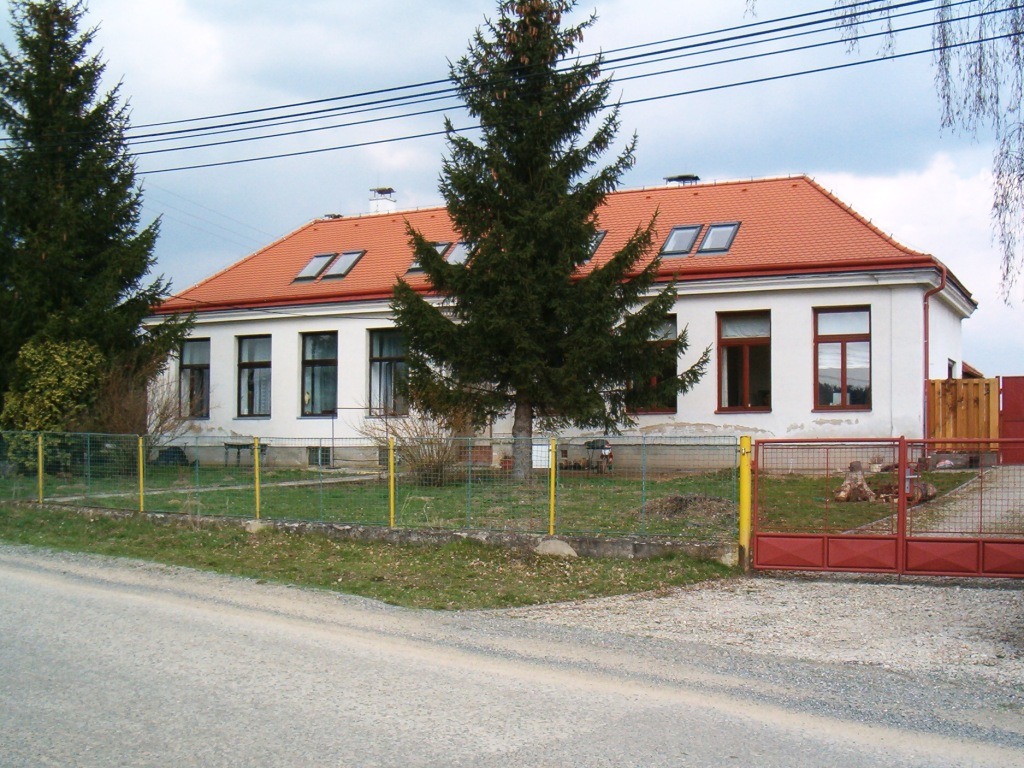 Česky: Bývalá škola ve Slavětíně